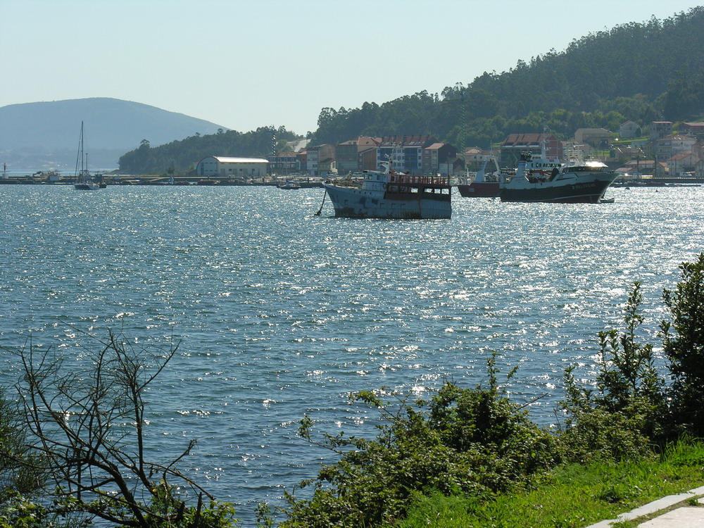 O Freixo de Sabardes, Serra de Outes, (Galiza)